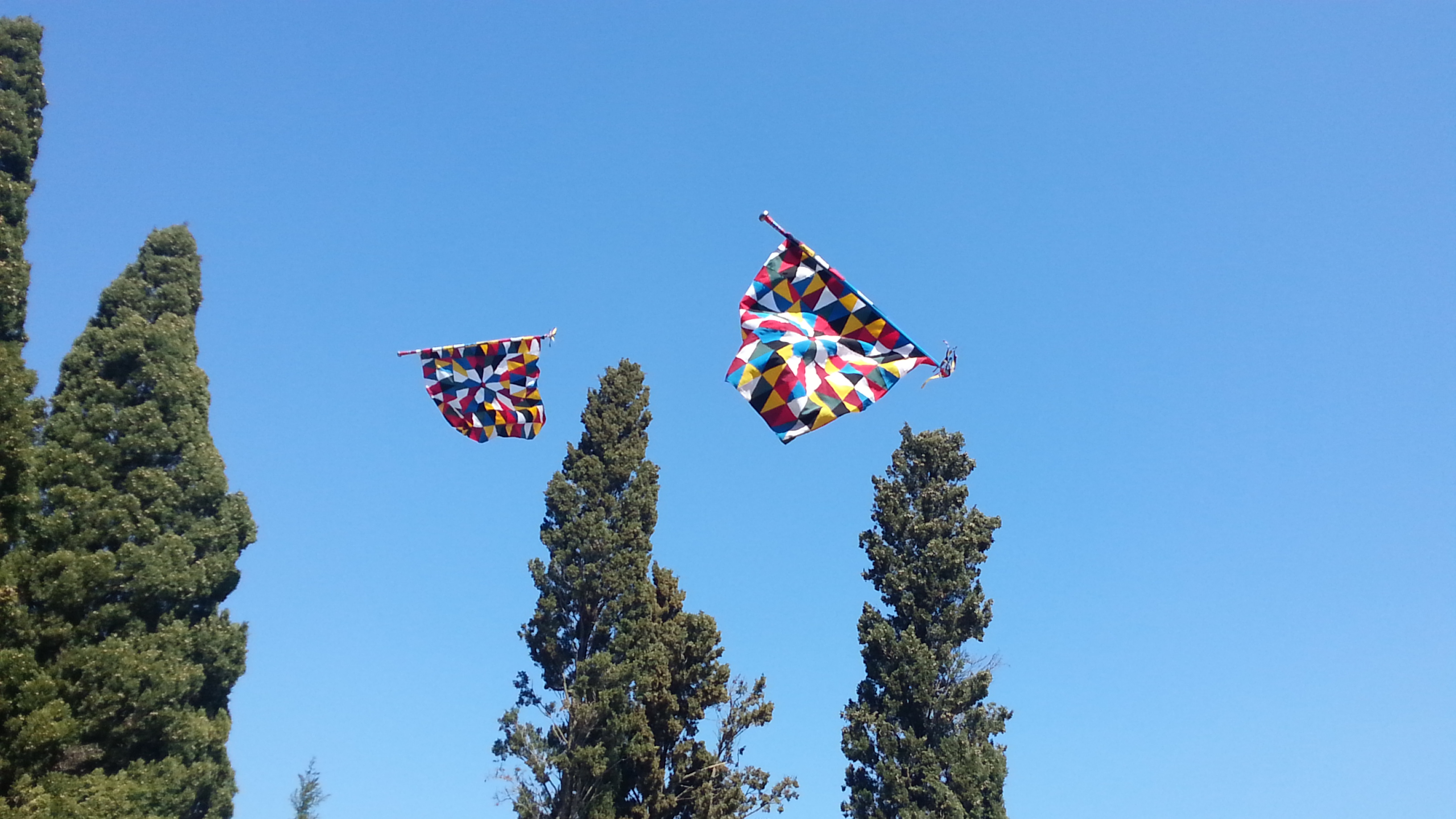 Lancio delle bandiere della Nzegna, il sabato dopo Pasqua